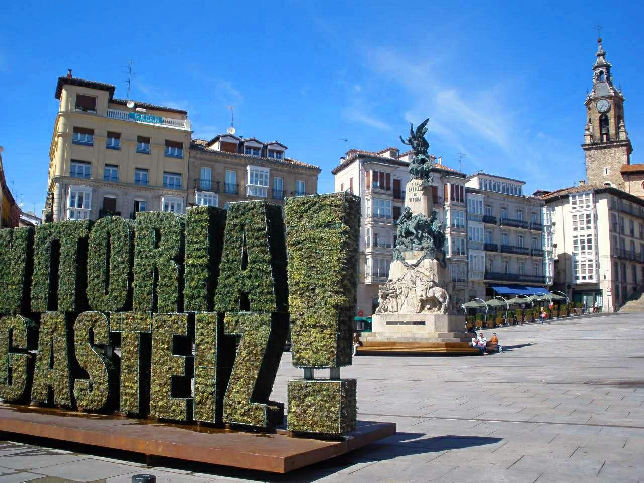 Plaza de la Virgen Blanca, Vitoria-Gasteiz